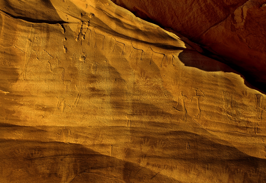 Gacelas grabadas en el friso de la cueva.